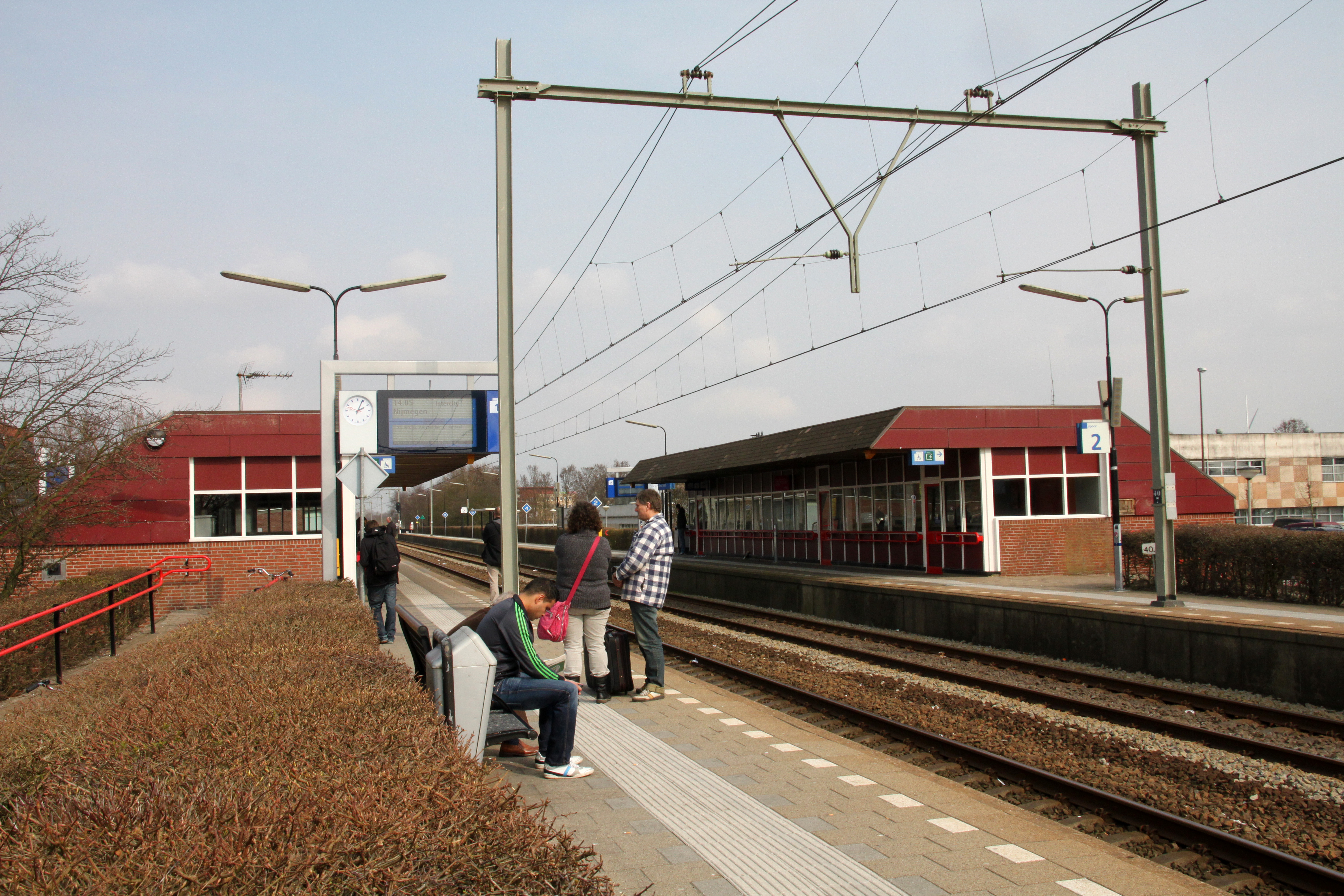 De beide perrons van station Alkmaar Noord.